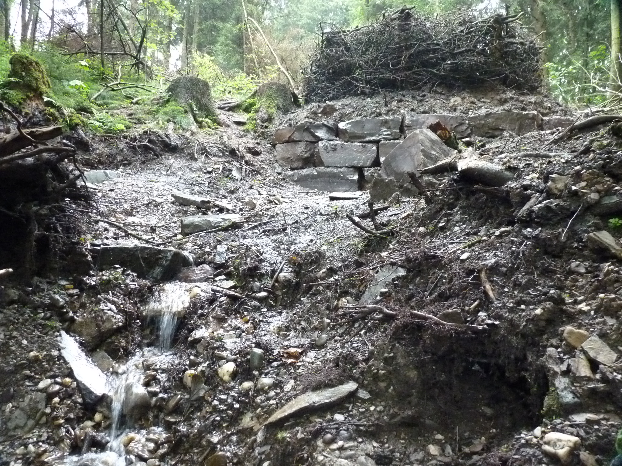 Die renaturierte Ferndorfquelle im Jahre 2014